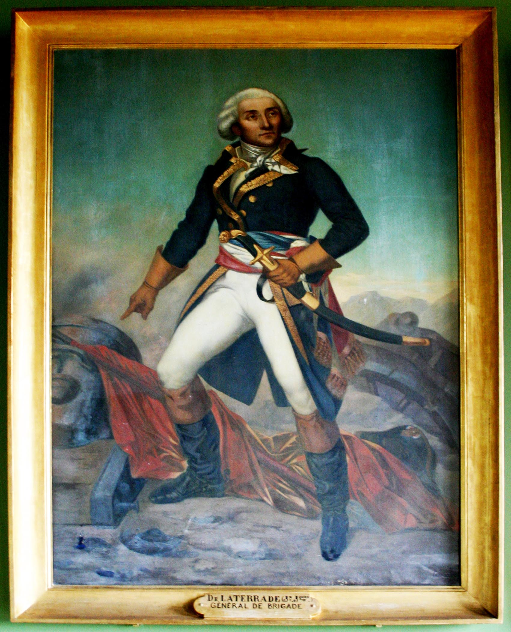 Portrait de Laterrade, salle des illustres à Lectoure (Gers, France)